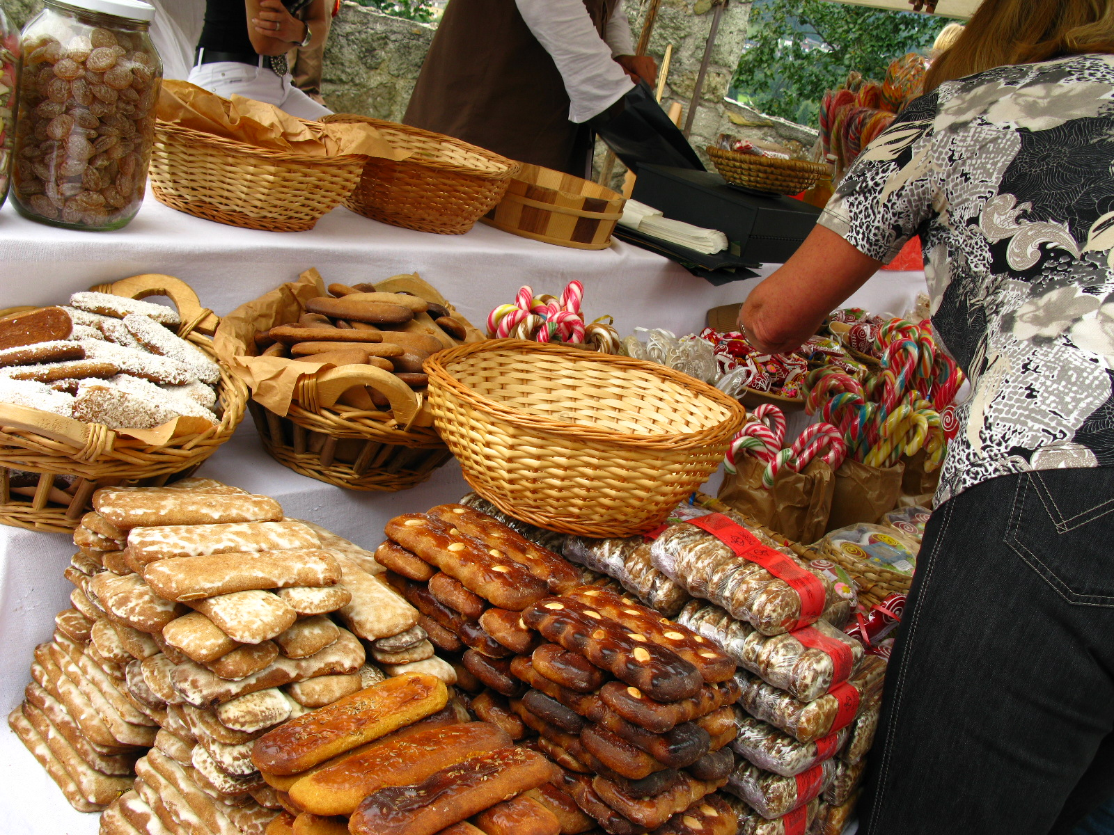 Srednjeveški dan na velenjskem gradu, 09. 08. Dia medieval no castelo de Velenje, 09. 08